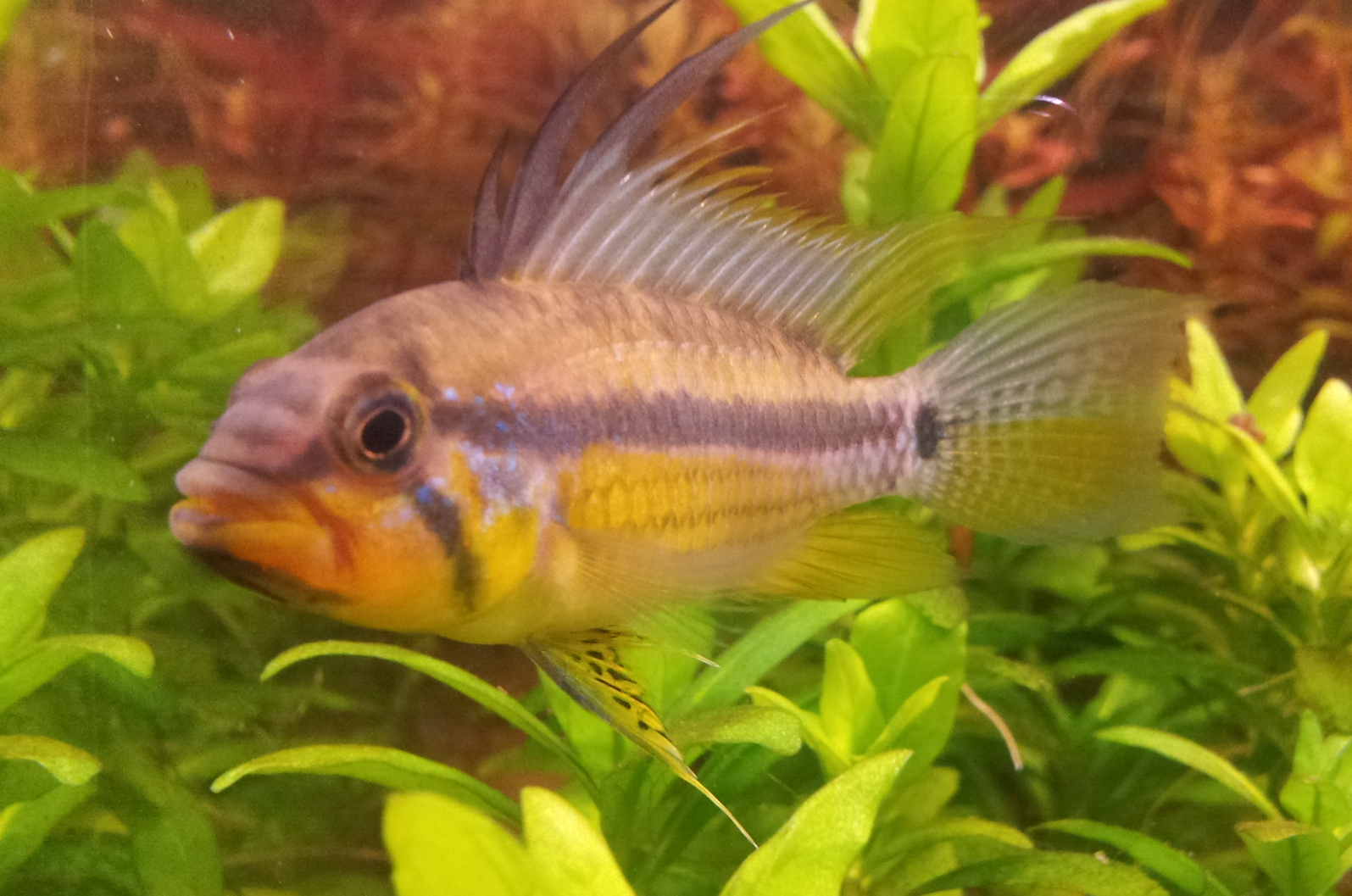 Apistogramma allpahuayo Schwarzkinn-Zwergbuntbarsch